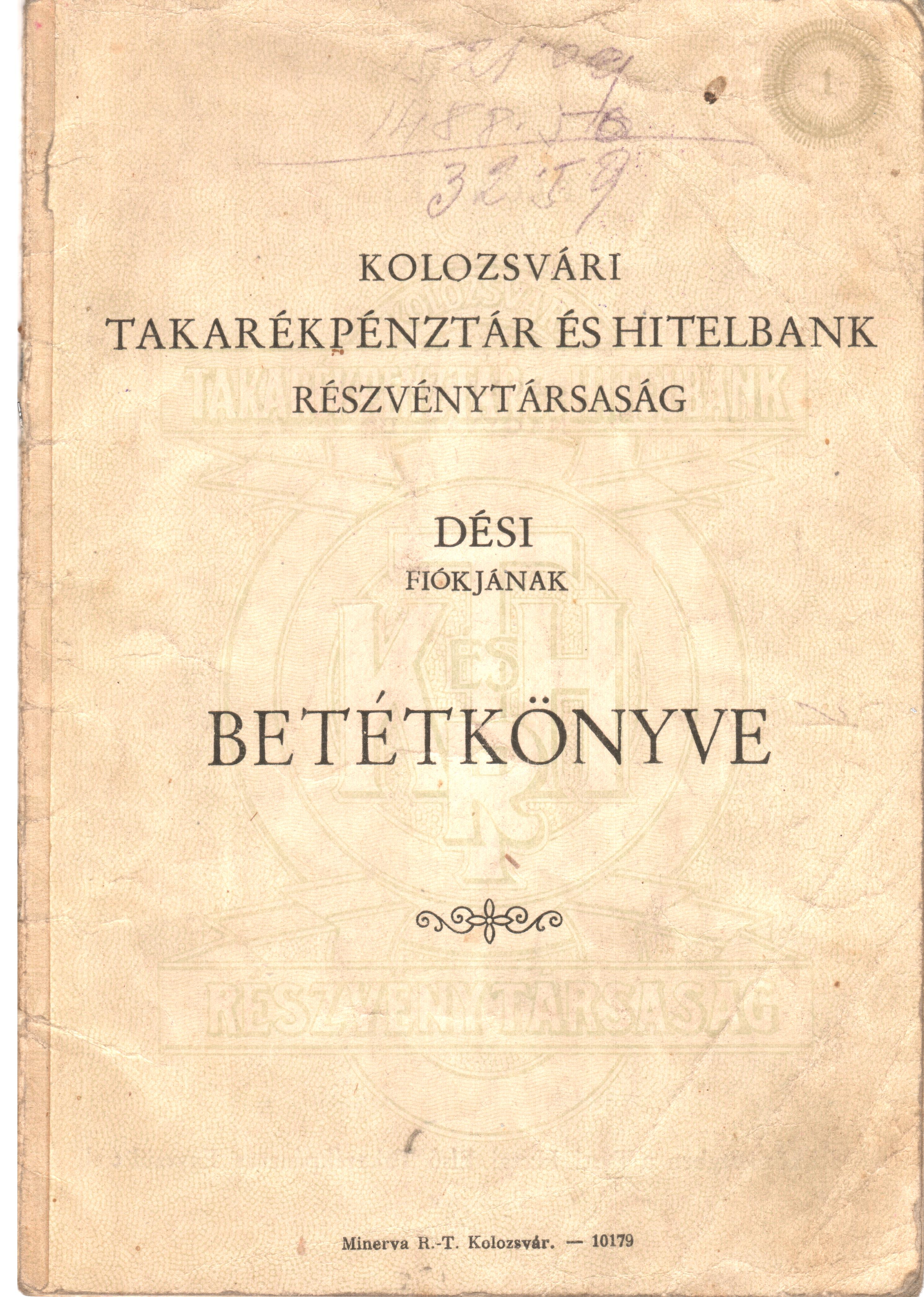 A Kolozsvári Takarékpénztár és Hitelbank Részvénytársaság Dési Fiókjának betétkönyve. Minerva R.T. Kolozsvár 10179, Dr. Rácz Lajos Nagyilonda 11556 számú betétkönyv. A nagyilondai közjegyző családi betétkönyve a háborús évek alatti (1941. december 30 – 1944. szeptember 28). 1944. december 28-án először 1000 Pengőt, majd 521,09 Pengőt vettek fel. A bécsi döntéstől kezdődően a Magyar Királysághoz visszacsatolt terület ismételten Romániához került. Az egész Rácz család a betétkönyvben levő pénz felvételét követően, október hónapban egész vagyonát hátrahagyva Budapestre menekült. Először a két lány - Rácz Erzsébet és Rácz Lili - menekült, majd őket követték szüleik is. (Dr. Rácz Lajos és Dr. Rácz Lajosné Pruner Margit Melánia). R.T. betétkönyve. A teljes betétkönyv megjelent a Metapolisz DVD sorozatban. ©© Derzsi Elekes Andor, Budapest, 2014, A kép és filmfelvételek egészben, vagy részletekben másolását, bármilyen úton történő sokszorosítását és felhasználását a szerző ellenérték nélkül, jogutódjaira is kihatóan megengedi. Az engedély kiterjed a kereskedelmi célú hasznosításra is. Kéri azonban nevének feltüntetését a felhasználás során. A Metapolisz sorozat valamennyi képe és filmje Creative Commons alatti valamint kereskedelmi - for profit - célra is felhasználható. Ajánlott hivatkozás: Derzsi Elekes Andor: Metapolisz DVD line